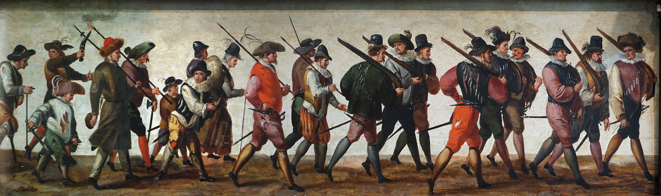 Gdańska piechota zaciężna, malowidło z końca XVI w. z Dworu Artusa w Gdańsku, autor nieznany